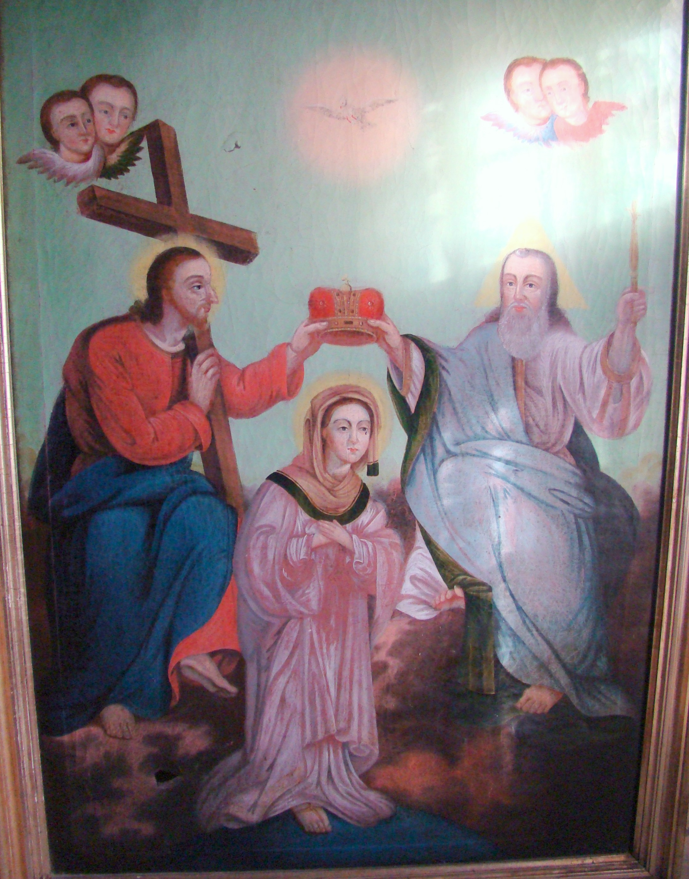 Biserica „Nașterea Născătoarei de Dumnezeu" din Hălmagiu, județul Arad